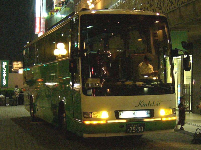 登録番号 大阪22か75-30 近鉄バス所属 車番2652 夜行用車両 （各系統で共通運用） 2005年9月18日 あべの橋バスステーションにて撮影